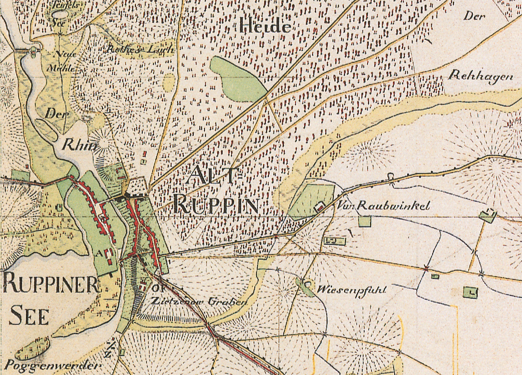 Alt Ruppin, Ortsteil der Stadt Neuruppin, Landkreis Ostprignitz-Ruppin, Brandenburg, Ausschnitt aus dem Urmesstischblatt 3043 Lindow von 1825